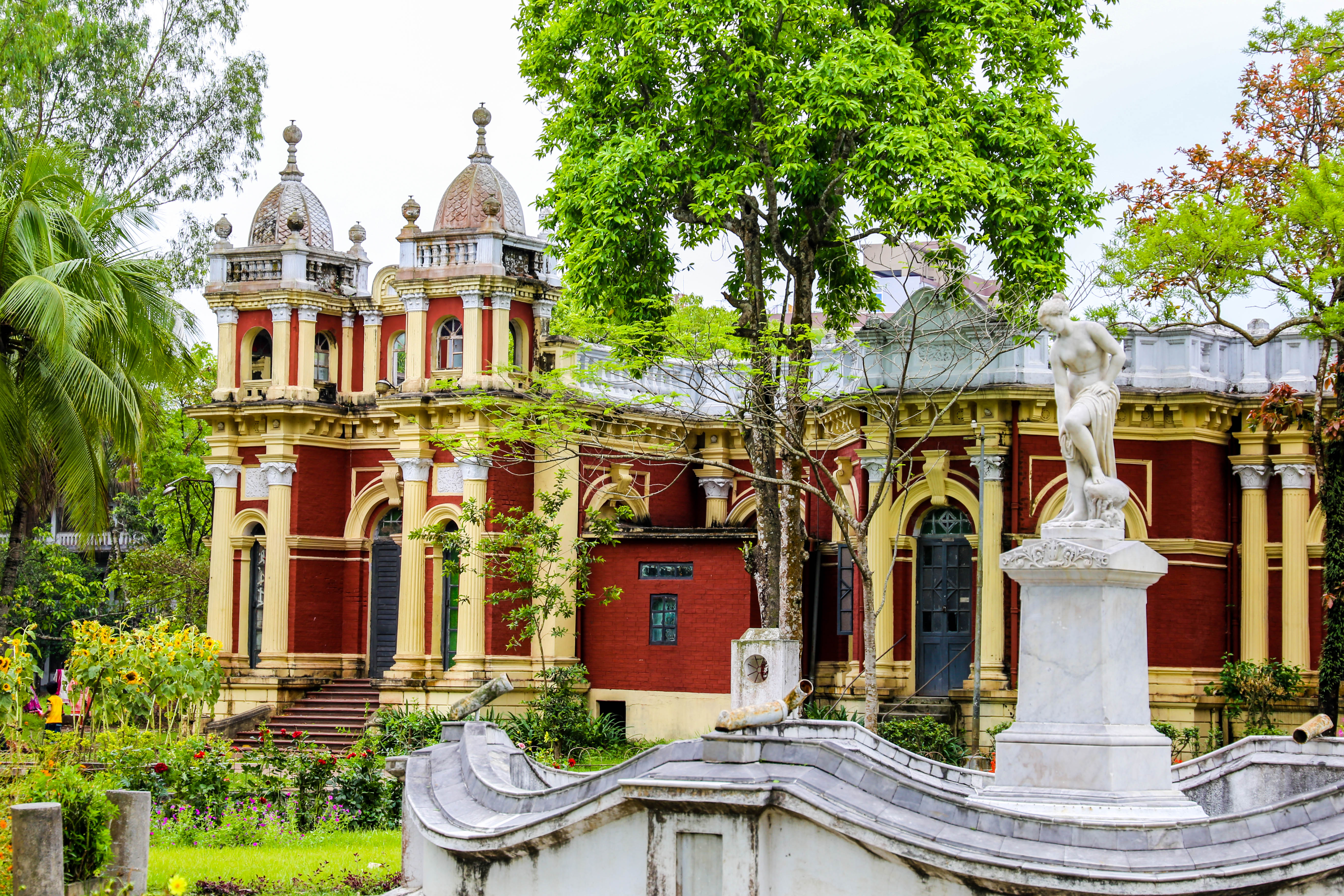 সবুজে শোভিত মনোরম প্রাসাদ